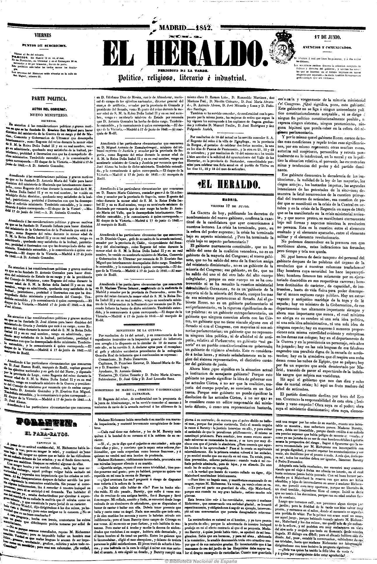 Primera página del número 2 del periódico español El Heraldo.